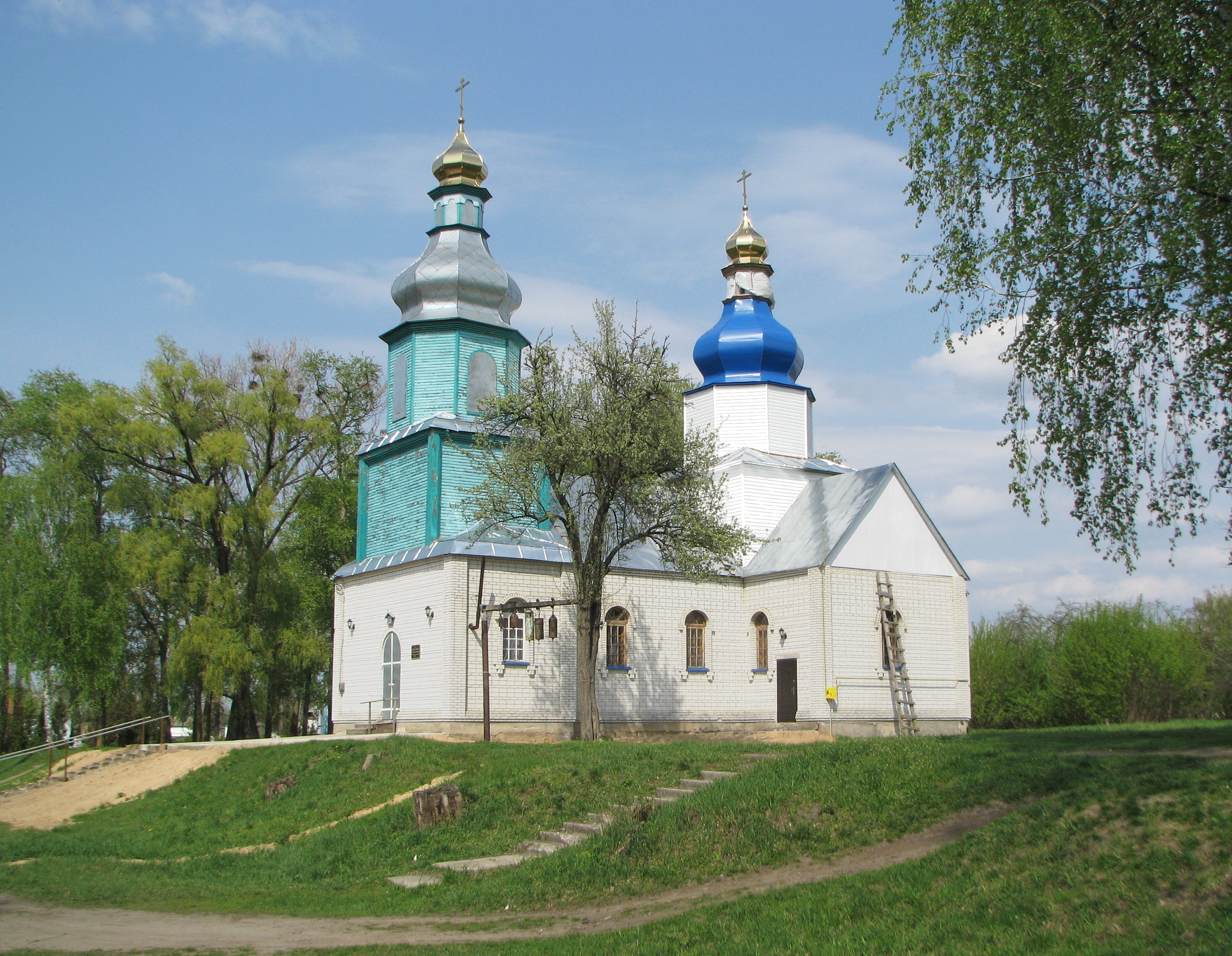 Храм Успіння Пресвятої Богородиці (УПЦ МП). Село Марківці, Бобровицький район, Чернігівська область.